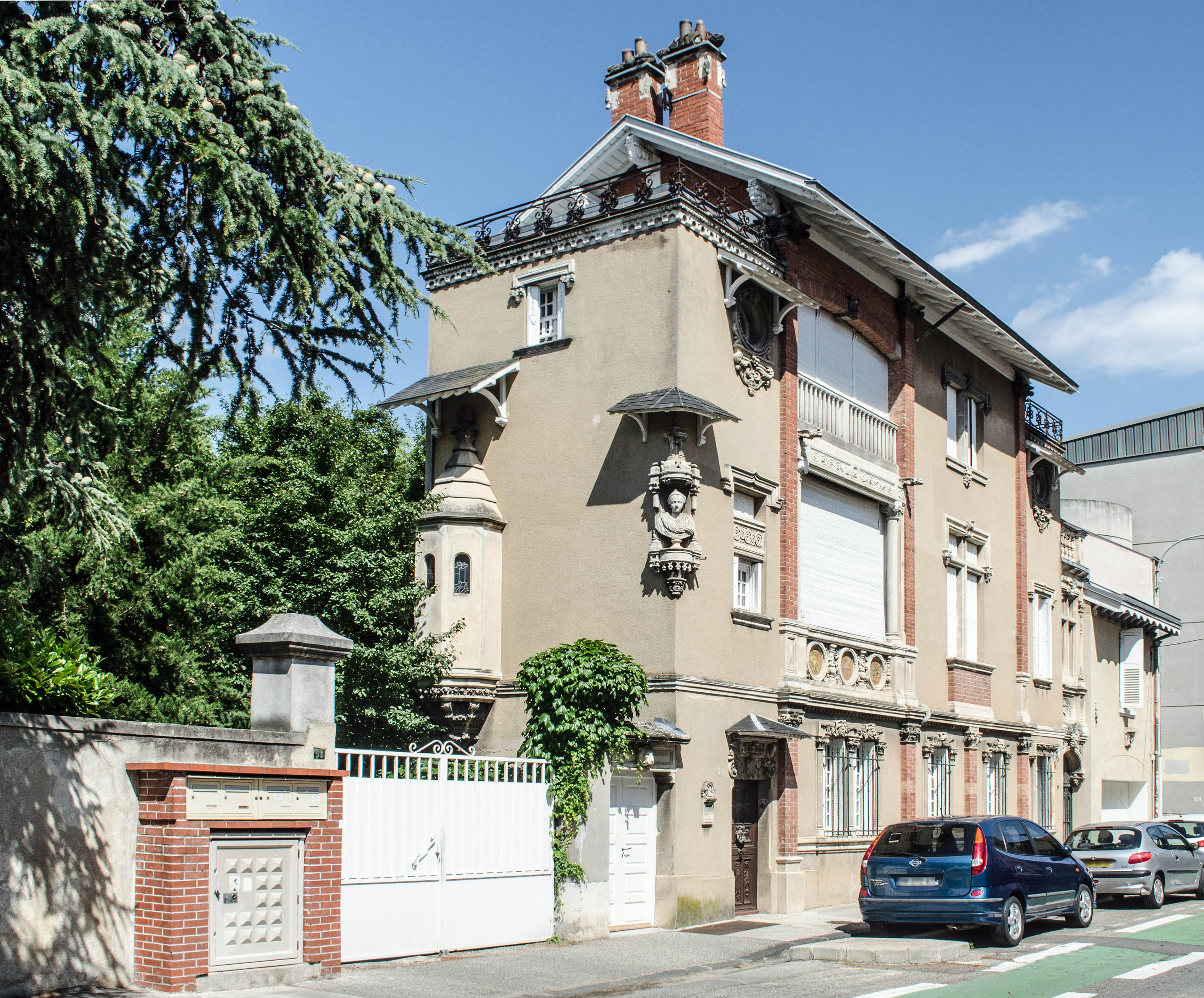 Valence (Drôme, France), Clos Genest : villa Margot, rue des Moulins, par Casimir Genest (1846-1918)